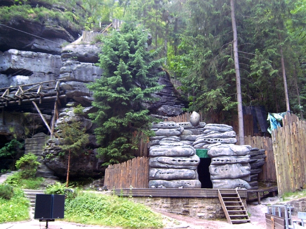 Felsenbühne Rathen in der Sächsischen Schweiz Felsenbühne Rathen, a natural amphitheater in the Saxon Switzerland